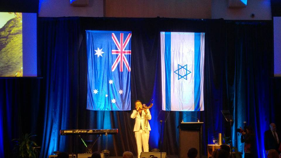 אריק דוידוב בהופעה באוסטרליה 2016